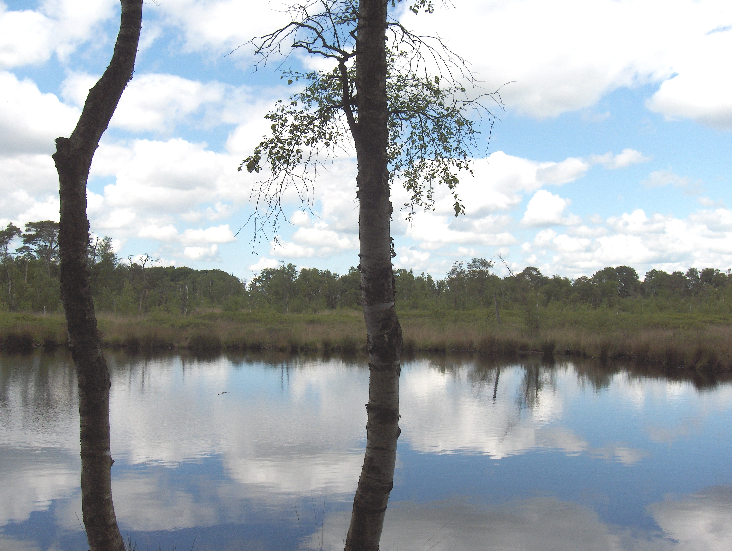 Appèlbergen